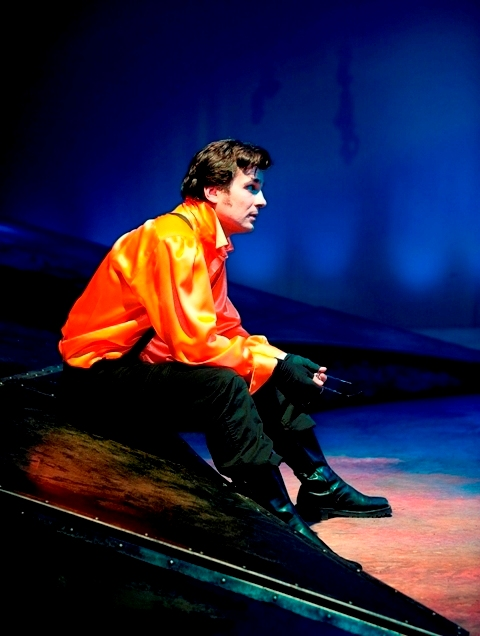 דניאל צ'רניש - הנסיכה איבון 2010 (1)